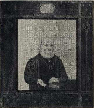 Biskop Christian Sørenssen, gouachetegning av Nicolai Wergeland.